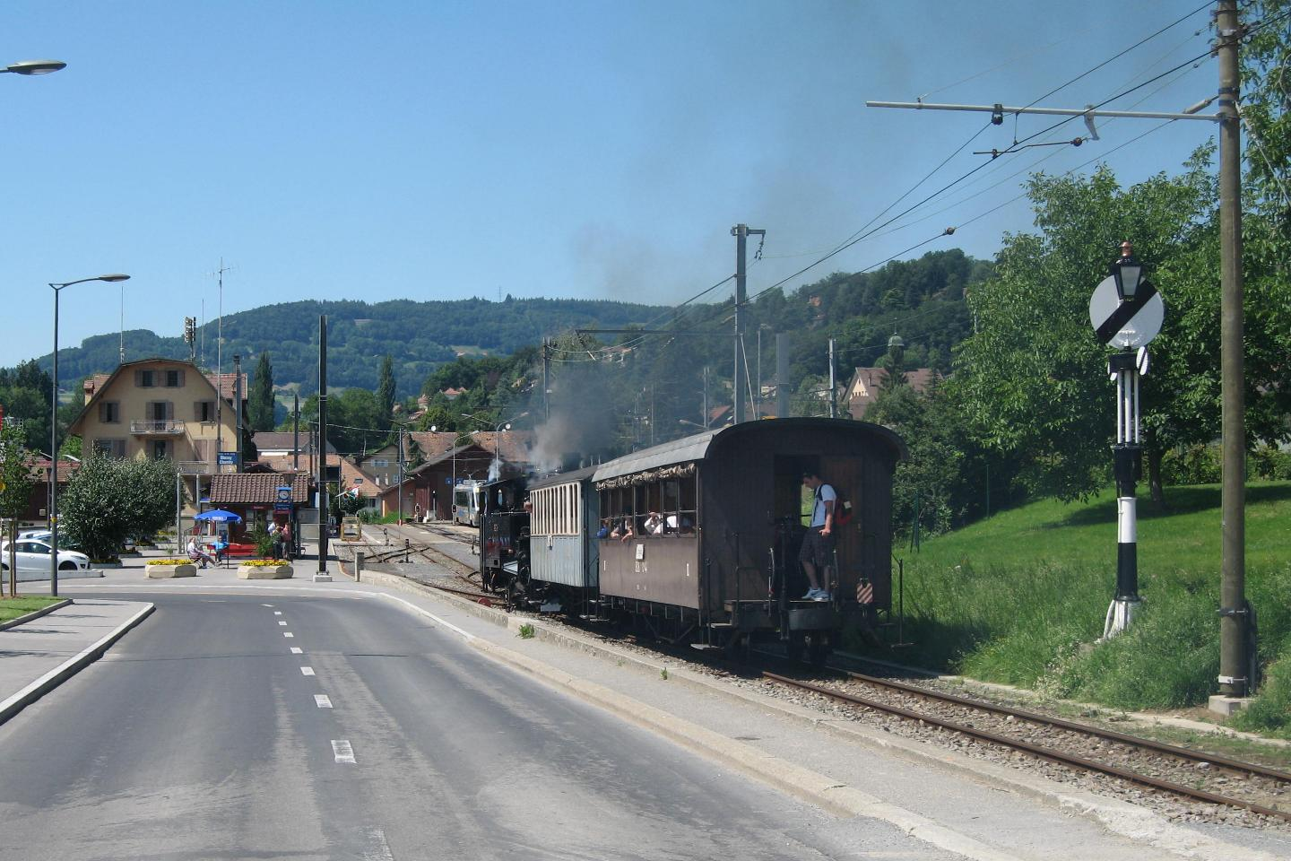 Bahnhof Blonay. Im Hintergrund der Bereich der Transports Montreux-Vevey-Riviera (MVR). Ganz im Hintergrund rechts befindet sich etwas abgedeckt der Triebwagen mit gemischtem Adhäsions- und Zahnradantrieb Beh 2/4 72. Links befindet sich der Bereich der Museumsbahn Blonay–Chamby (BC). Der Museumsbahn Zug bestehend aus der Dampflokomotive HG 3/4 3 der Brig–Furka–Disentis-Bahn (BFD), dem Personenwagen BC4 22 der Montreux–Berner Oberland-Bahn (MOB) sowie dem C4 44 der Berner Oberland-Bahnen (BOB) befindet sich gerade auf der Einfahrtsweiche. Links im Vordergrund unübersehbar die Rue des Oches, ganz rechts eine hippsche Wendescheibe.